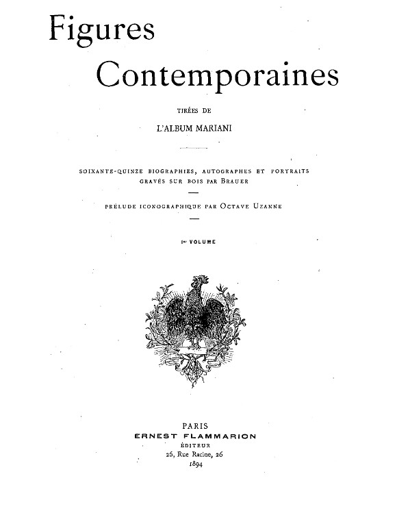 Page de titre de l'Album Mariani, tome premier, 1894